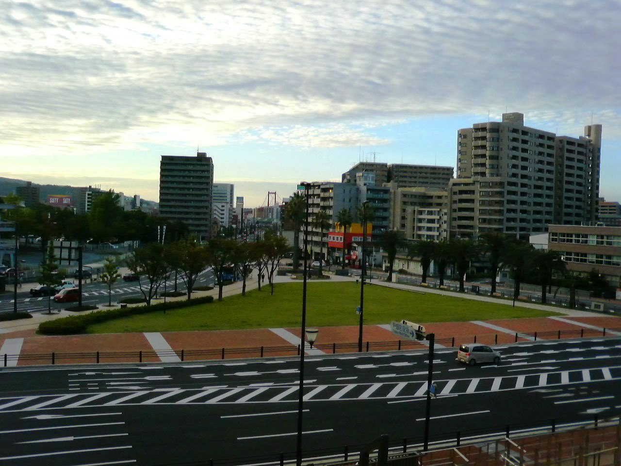 北九州市戸畑区の麻生1号公園 戸畑祇園大山笠の競演会場となります。